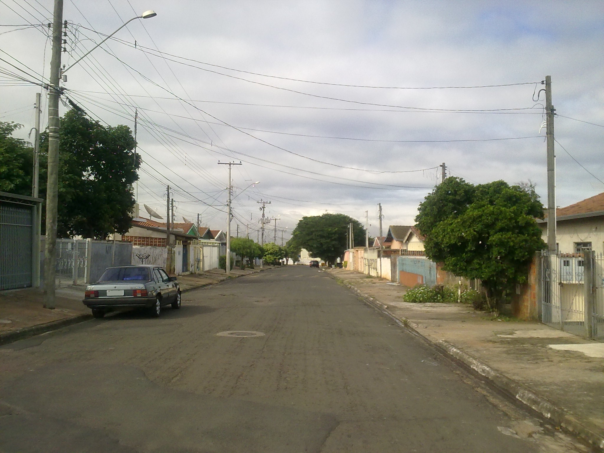 Rua Pastor Santino Soares da Silva, localizada no Bairro Matão em Sumaré-SP, a rua é conhecida também como Rua dos Crentes.